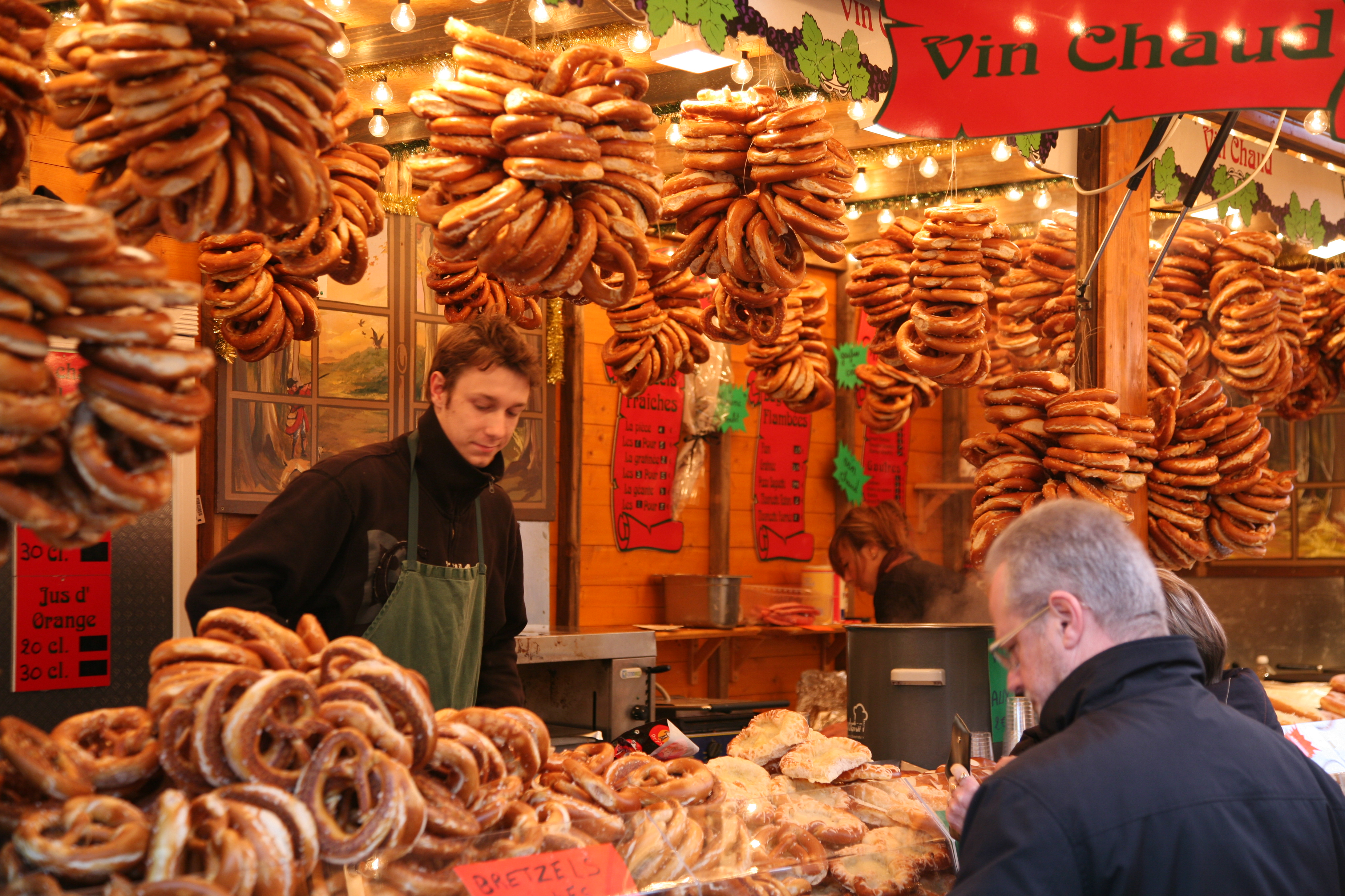 Le bretzel fut, dit-on , inventé par un boulanger d' Ingwiller. Fort aimé des villageois, ce boulanger avait un défaut, il jurait tellement contre le seigneur qu'il fût jeté en prison .En échange de sa liberté, le seigneur lui demanda de faire un gâteau dans lequel on pouvait voir 3 fois le soleil La forme du bretzel serait en fait liée à un très ancien culte solaire : sa forme d'origine aurait été une croix entourée d'un anneau que le temps et les modes de cuisson auraient dénaturé. Il existe en plusieurs versions : sucré, salé, aromatisé.